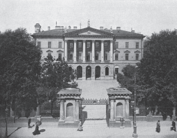 Здание госбанка со стороны Садовой улицы. Фото 1900 года